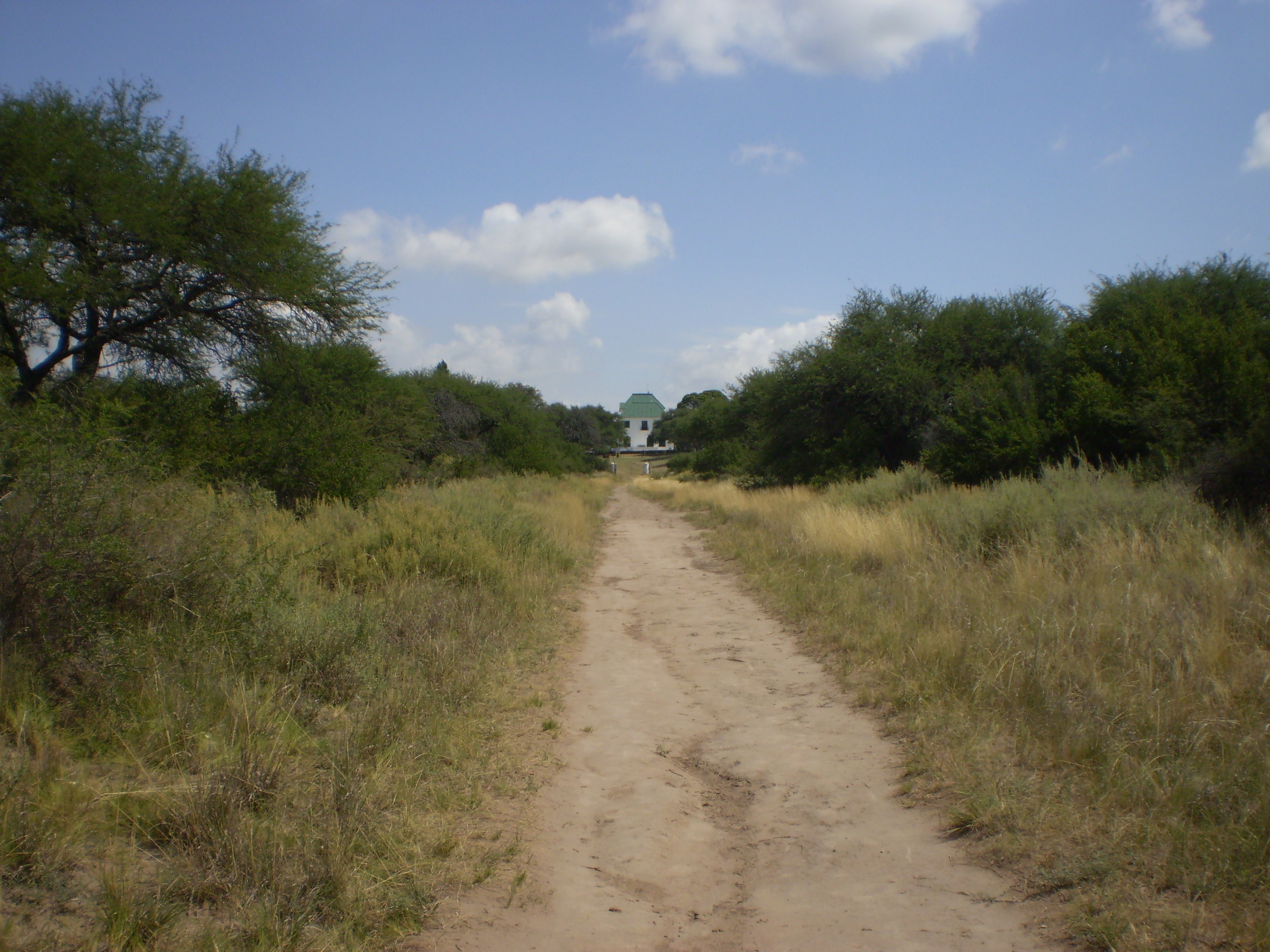 (Sendero de la laguna) Reserva natural "Parque Luro", La Pampa, Argentina